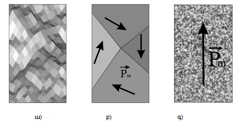 Ֆերոմագնետիկներ